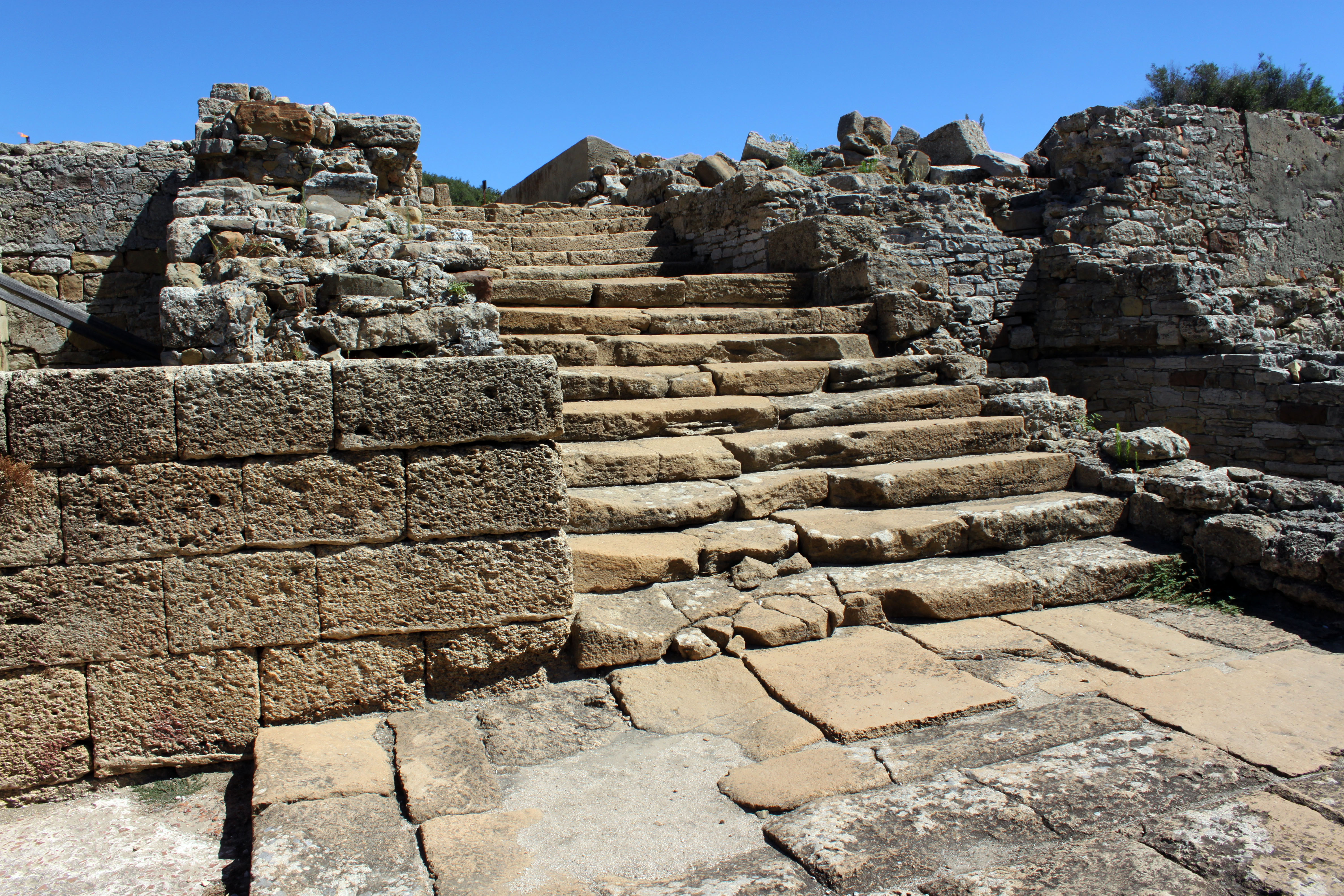 Estructuras visibles del Foro del yacimiento romano de Carteia. San Roque, Andalucía, España.